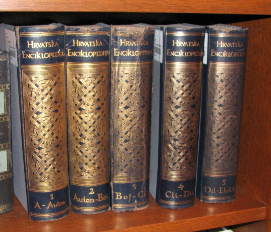 Hrvatska enciklopedija, gl. ur. Ujević, pet svezaka. Snimljeno u Hrvatskom državnom arhivu